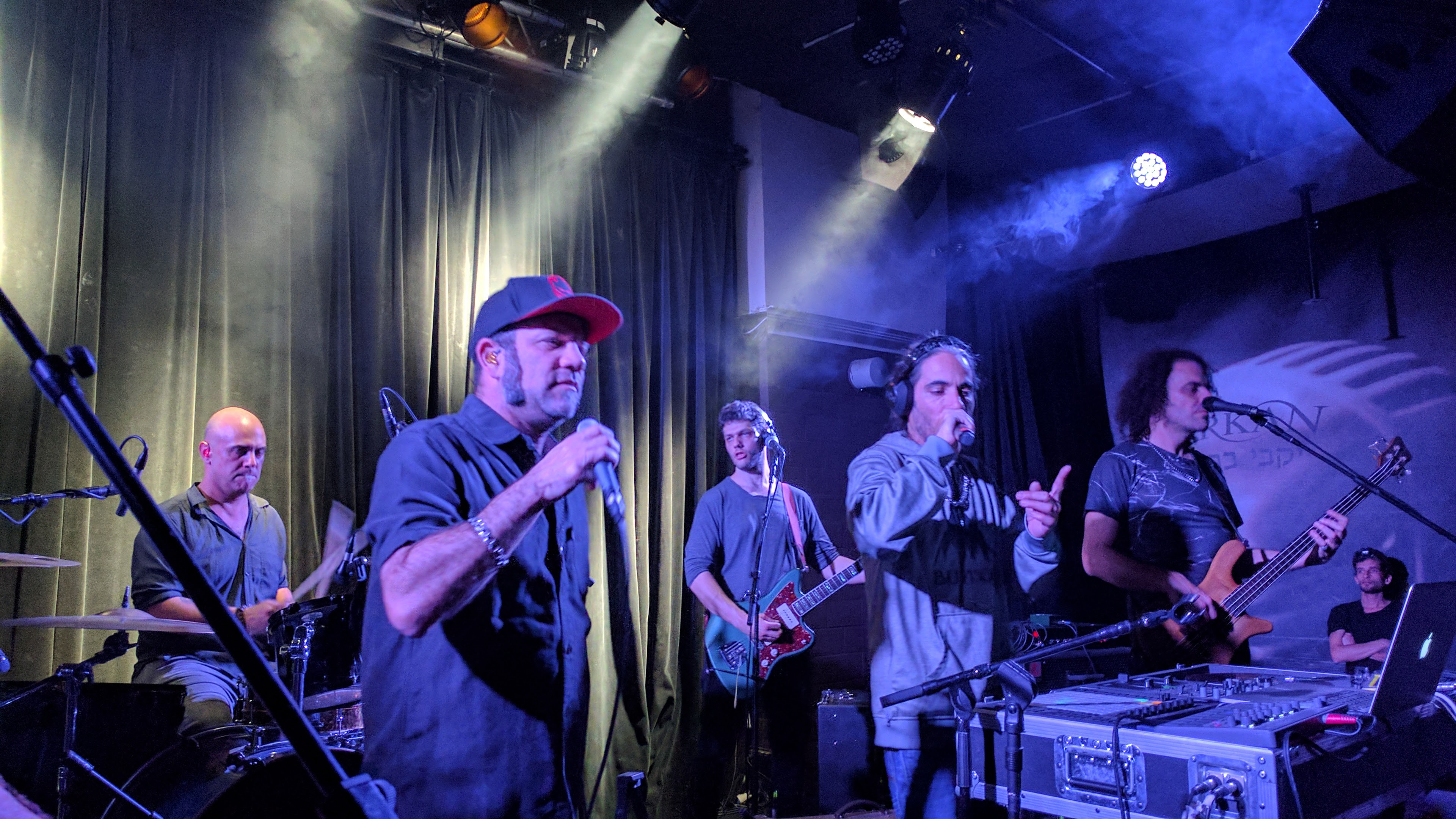 להקת הדג נחש בהופעה במועדון Zappa בתל אביב במהלך חודש דצמבר 2016